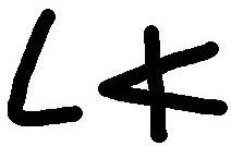 Het woord 'el' in het Fenicisch, eigen werk, vervang het gerust door iets beters.